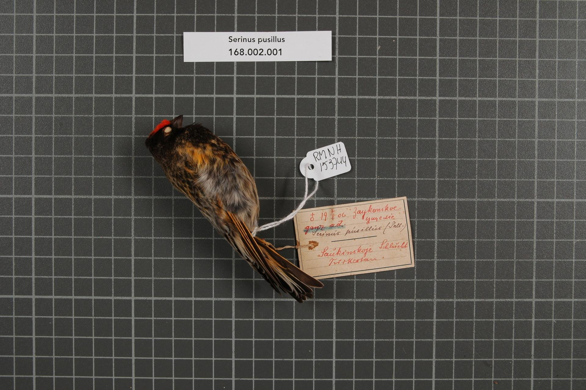 Serinus pusillus (Pallas, 1827)